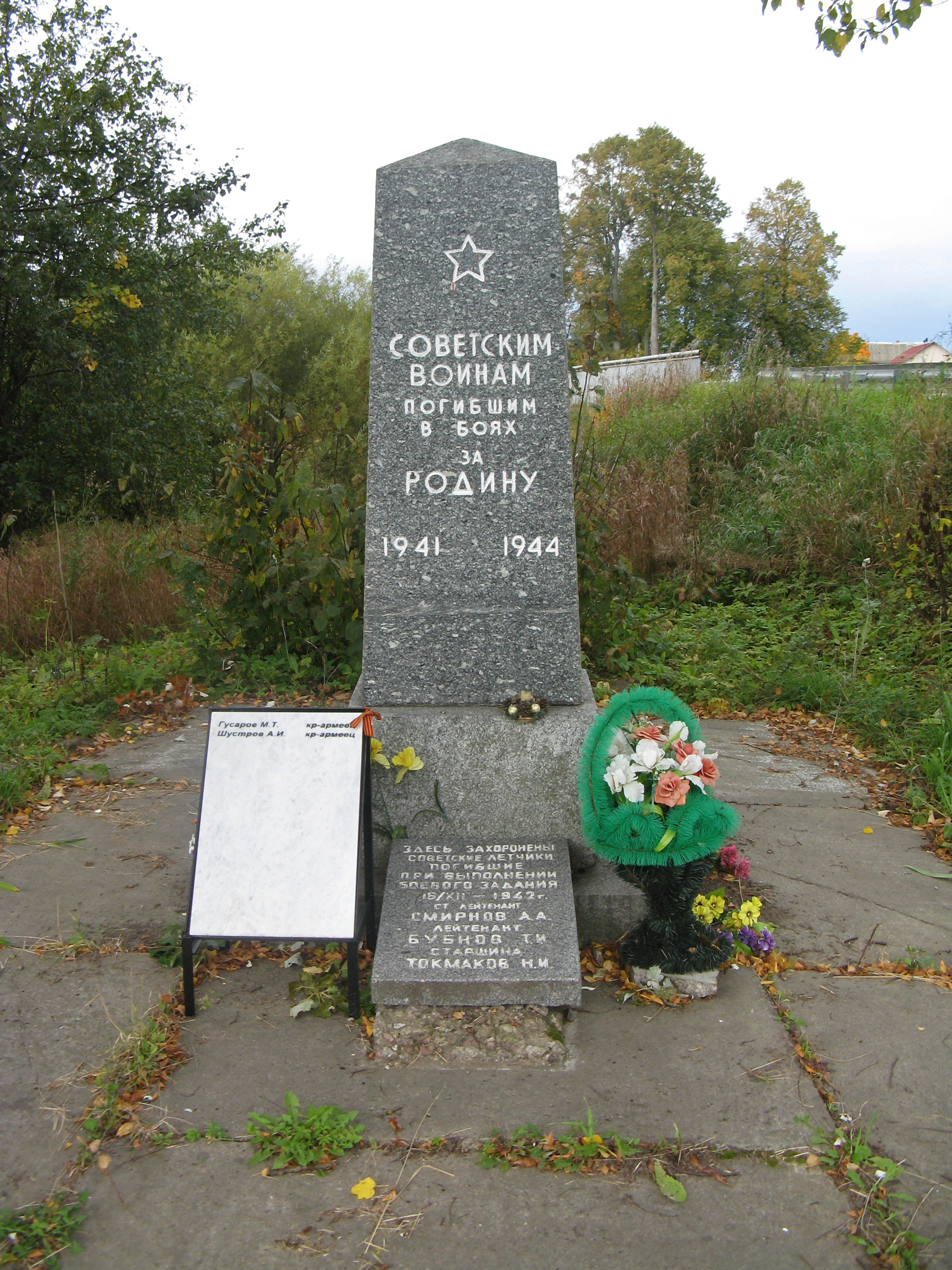 Братская могила советских воинов, погибших в борьбе с фашистами: центр, у моста, Низово, Кировский район, Ленинградская область